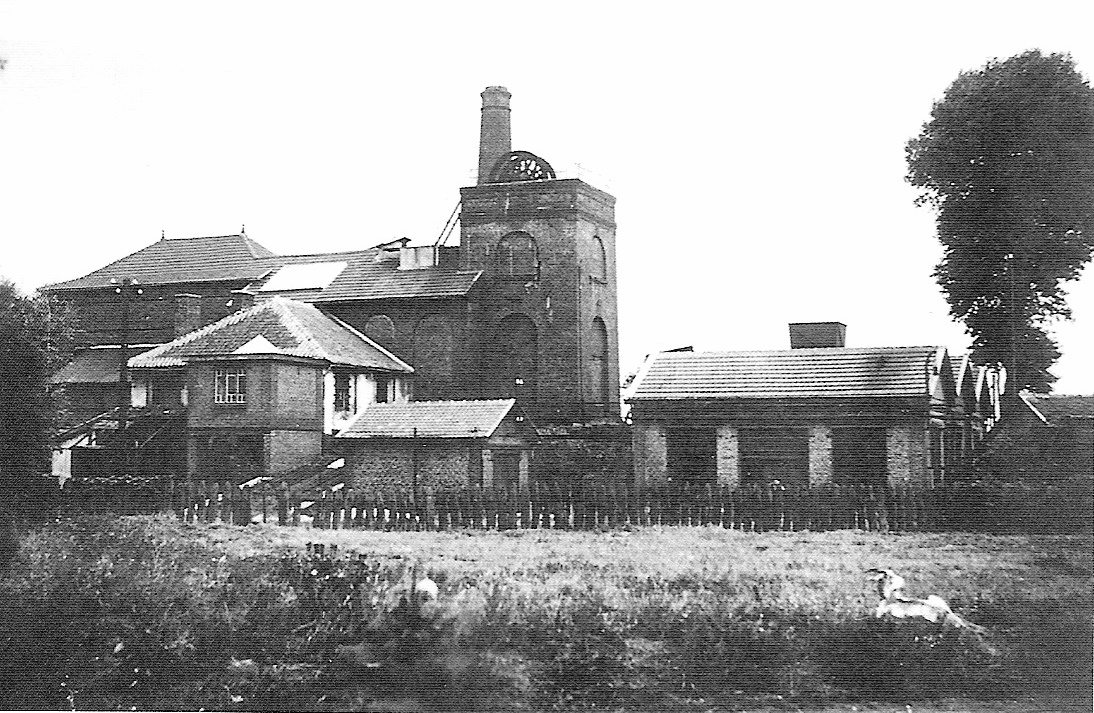 Photo issue de mes archives personnelles représentant la fosse Saint Martin autour de 1900